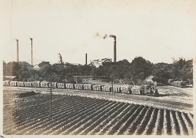 The sugar industrial rail in Takao, Taiwan